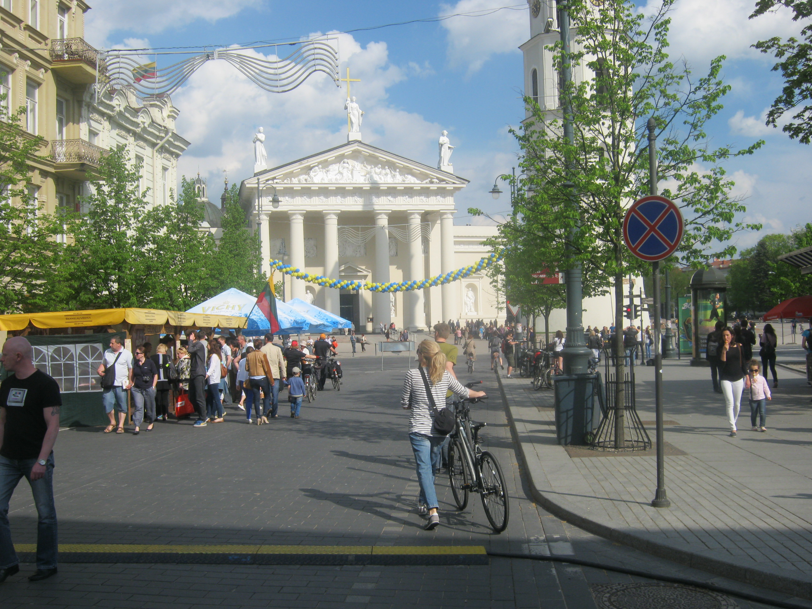 Europos dienos šventė ir Vilniaus arkikatedra